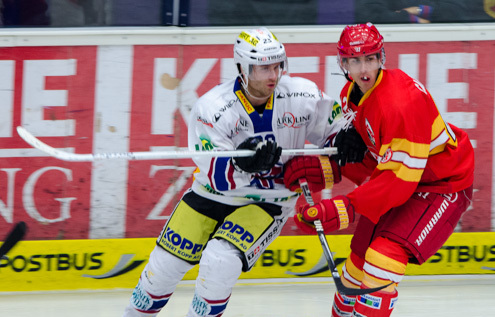 Düsseldorfer EG VS. EHC Biel